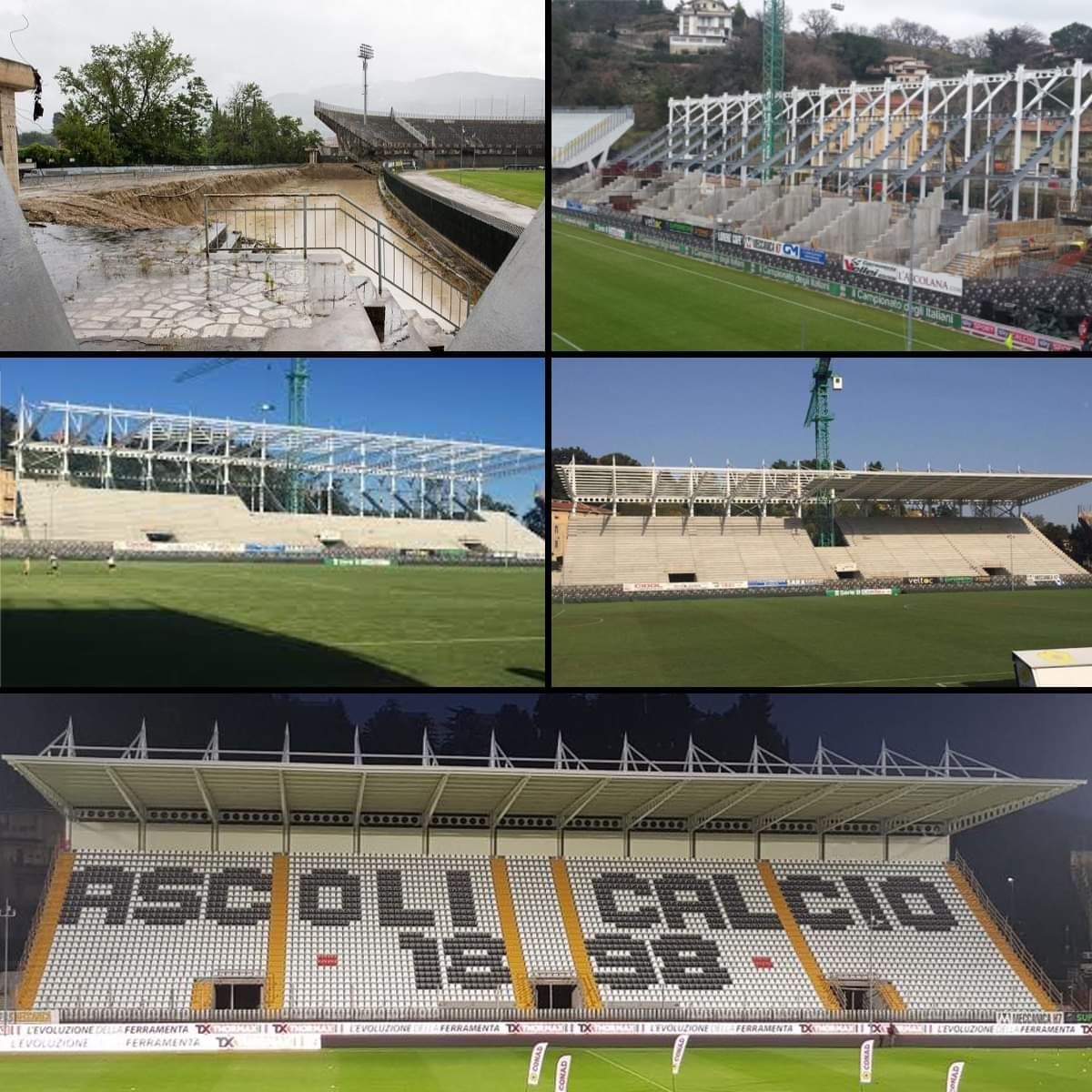 Le varie fasi di costruzione dello stadio Cino e Lillo del Duca di Ascoli Piceno.